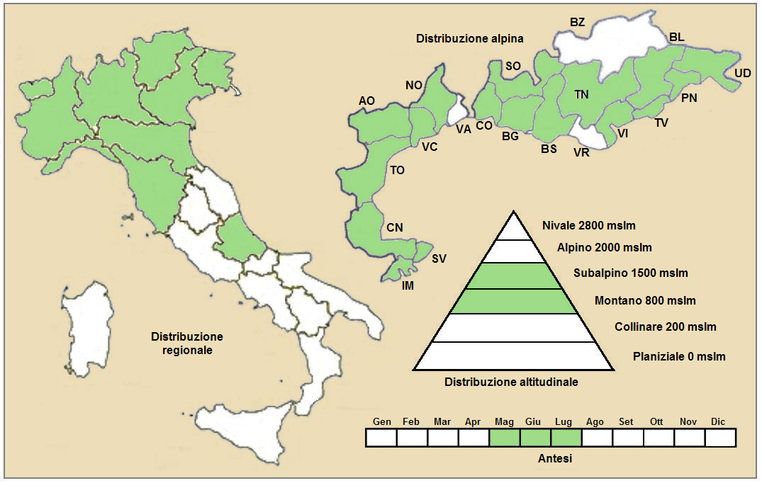 Anemone narcissiflora - Distribuzione